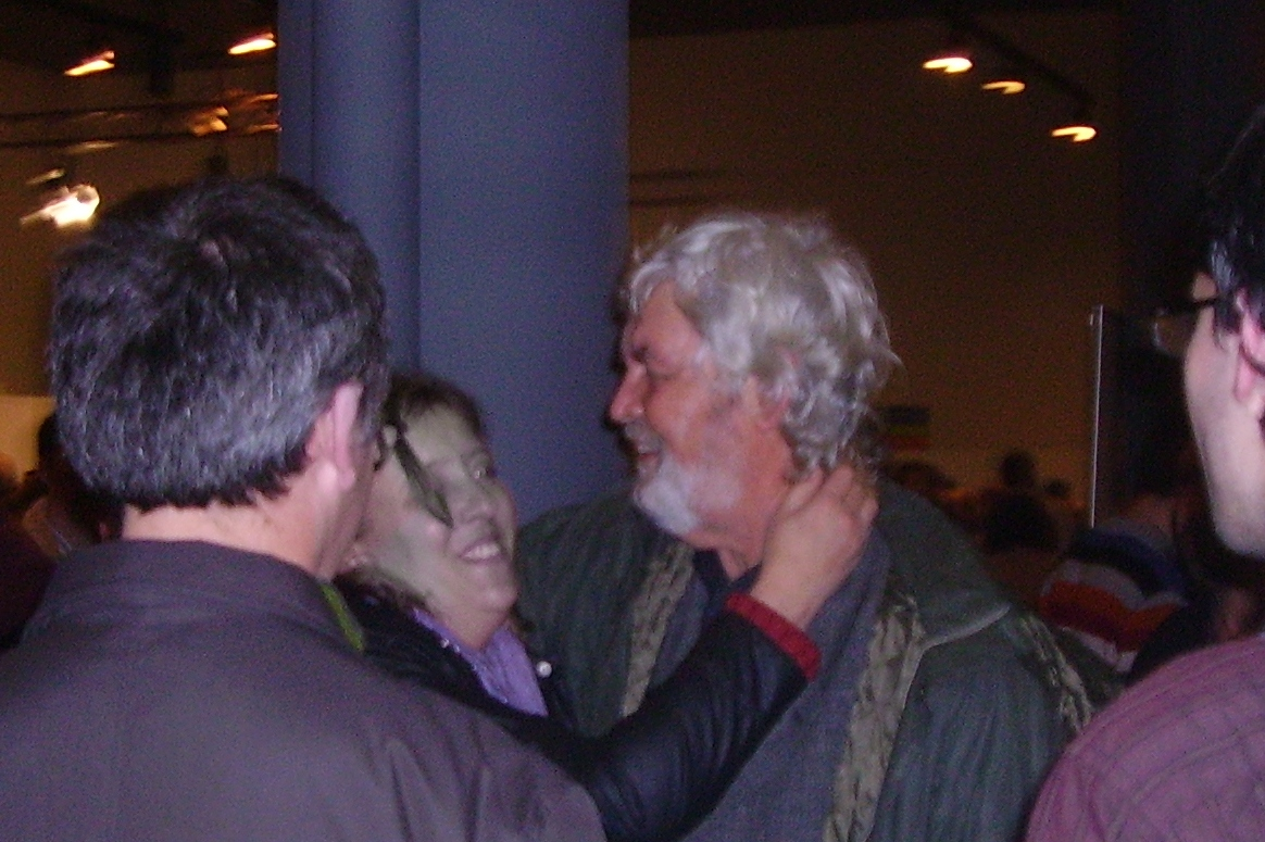 El político del Bloque Nacionalista Gallego (BNG) Xosé Manuel Beiras